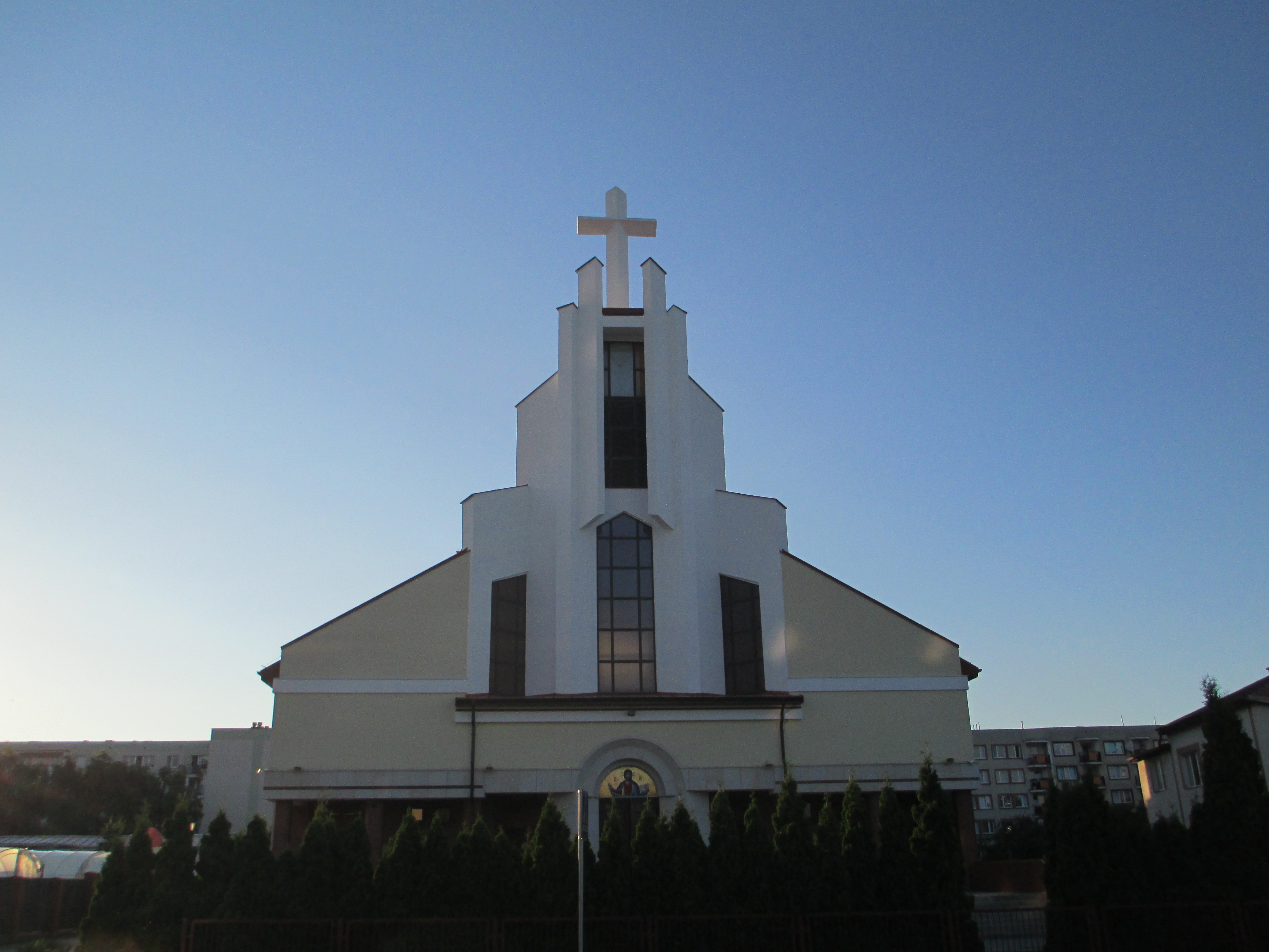 Ełk - Parafia Chrystusa Sługi